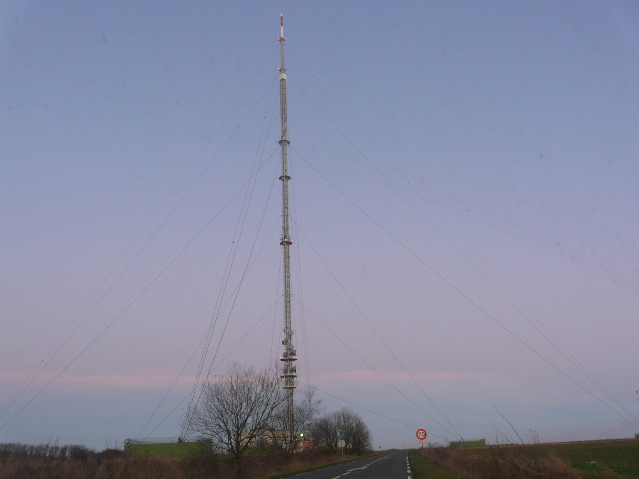 Emetteur de Bouvigny-Boyeffles, Pas-de-Calais (62)